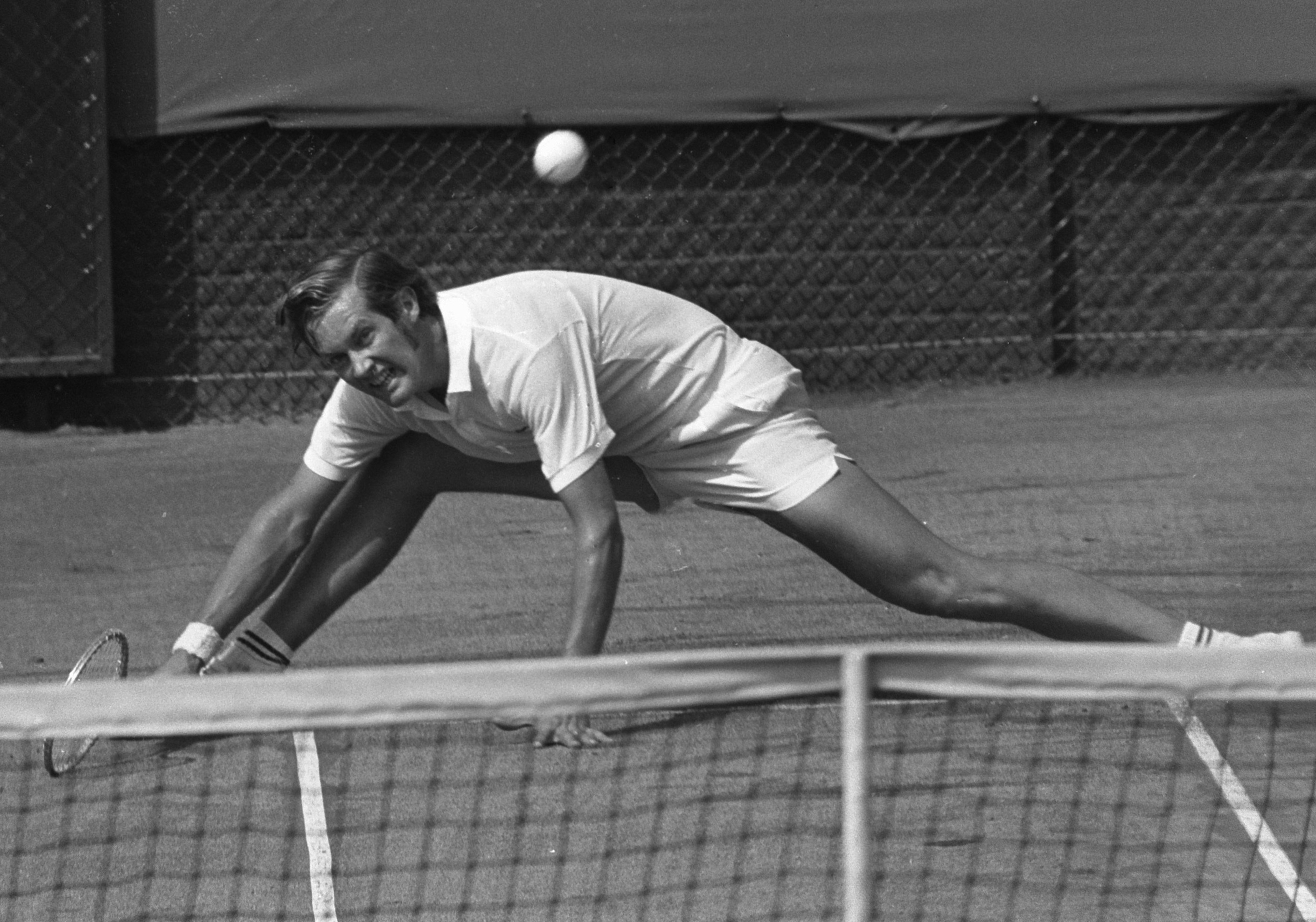 Internationale tenniskampioenschappen in Hilversum ('t Melkhuisje ); Kalogeropoulos (Griekenland) in aktie